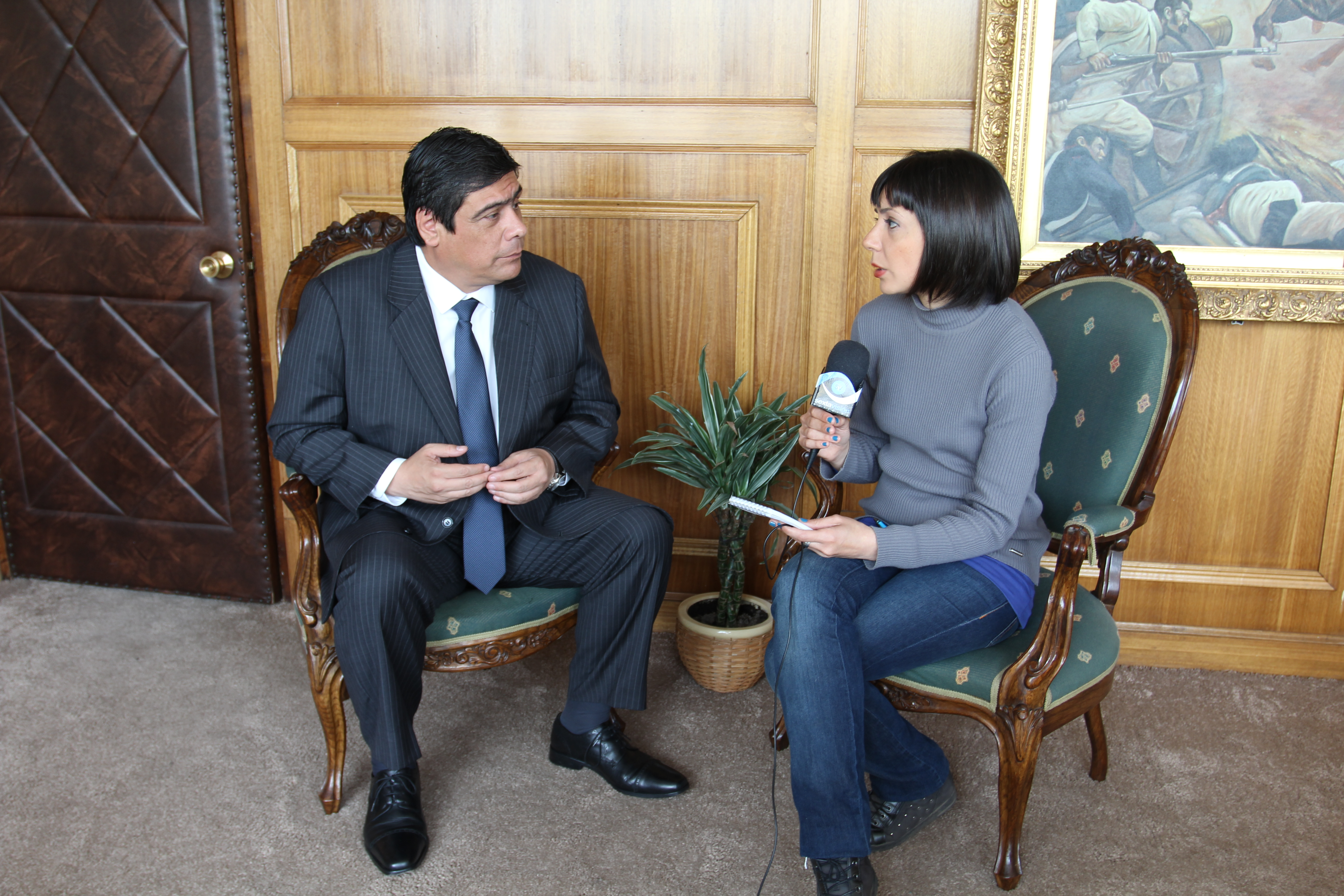 Víctor Osorio entrevistado por periodista del Canal Sexta Visión de Rancagua.